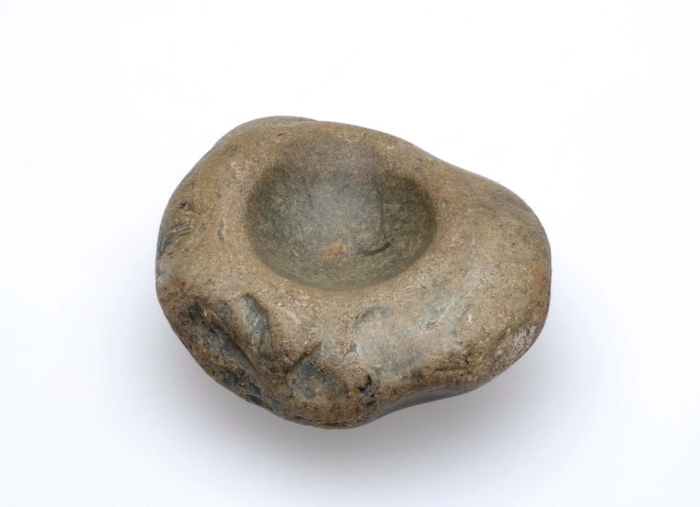 Een mortier wordt normaal gebruikt tijdens de maaltijdbereiding om voedsel in fijn te stampen. Dit exemplaar is echter nogal klein, de veronderstelling lijkt dan ook gerechtvaardigd dat deze mortier gebruikt werd bij het fijnmaken van kleine hoeveelheden. Bijvoorbeeld voor medicijnen want volgens de informatie bij het object is deze mortier gebruikt door een medicijnman.